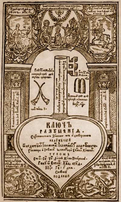 Гравюра титульного листа книги: Иоаникий (Галятовский). Ключ разумения. — Киев., 1659.